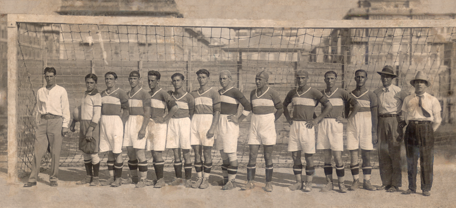 Una rarissima fotografia di una formazione dell' Unione Sportiva Alessandro Volta